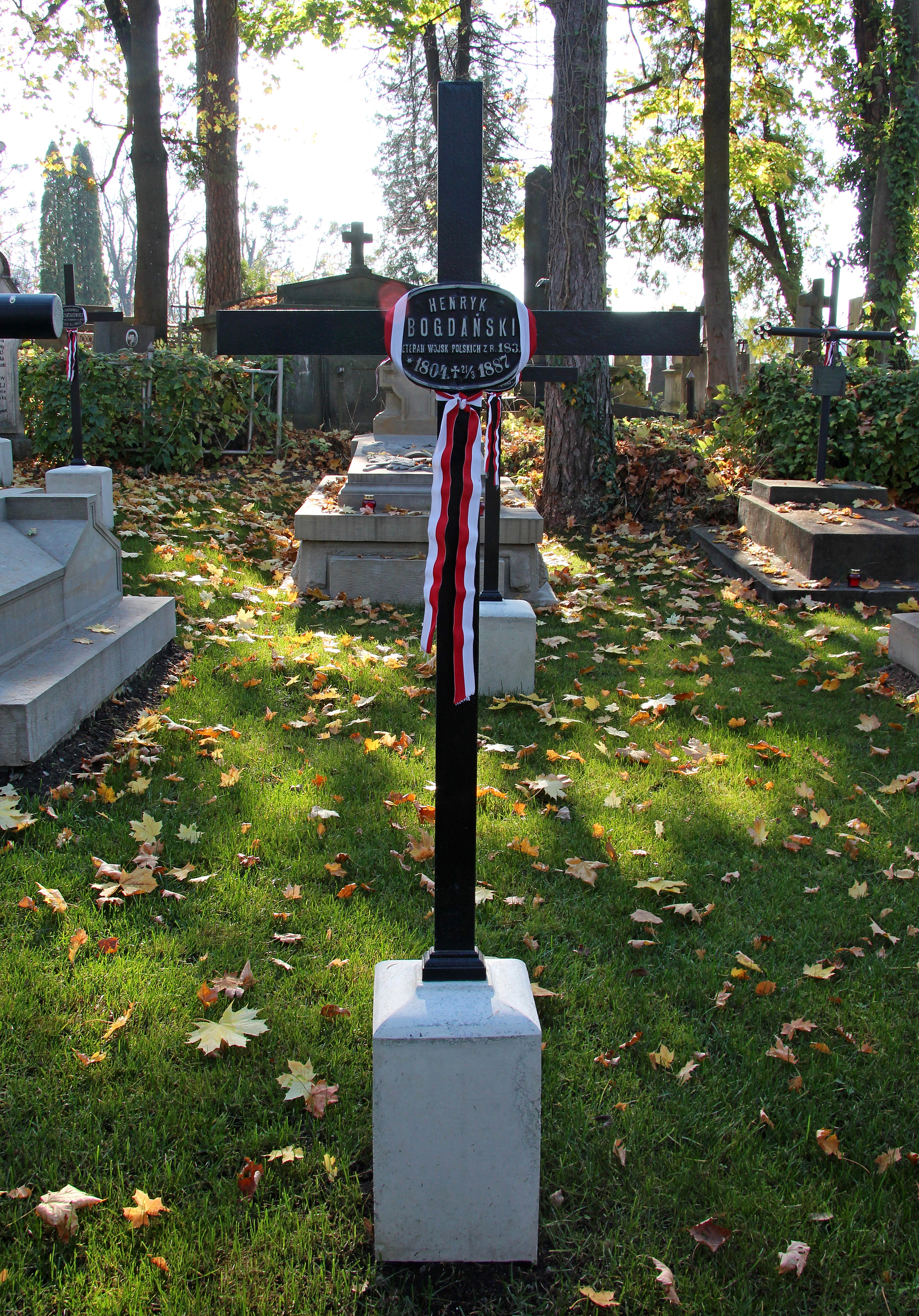 Могила Г. Богданського.Личаківський цвинтар.